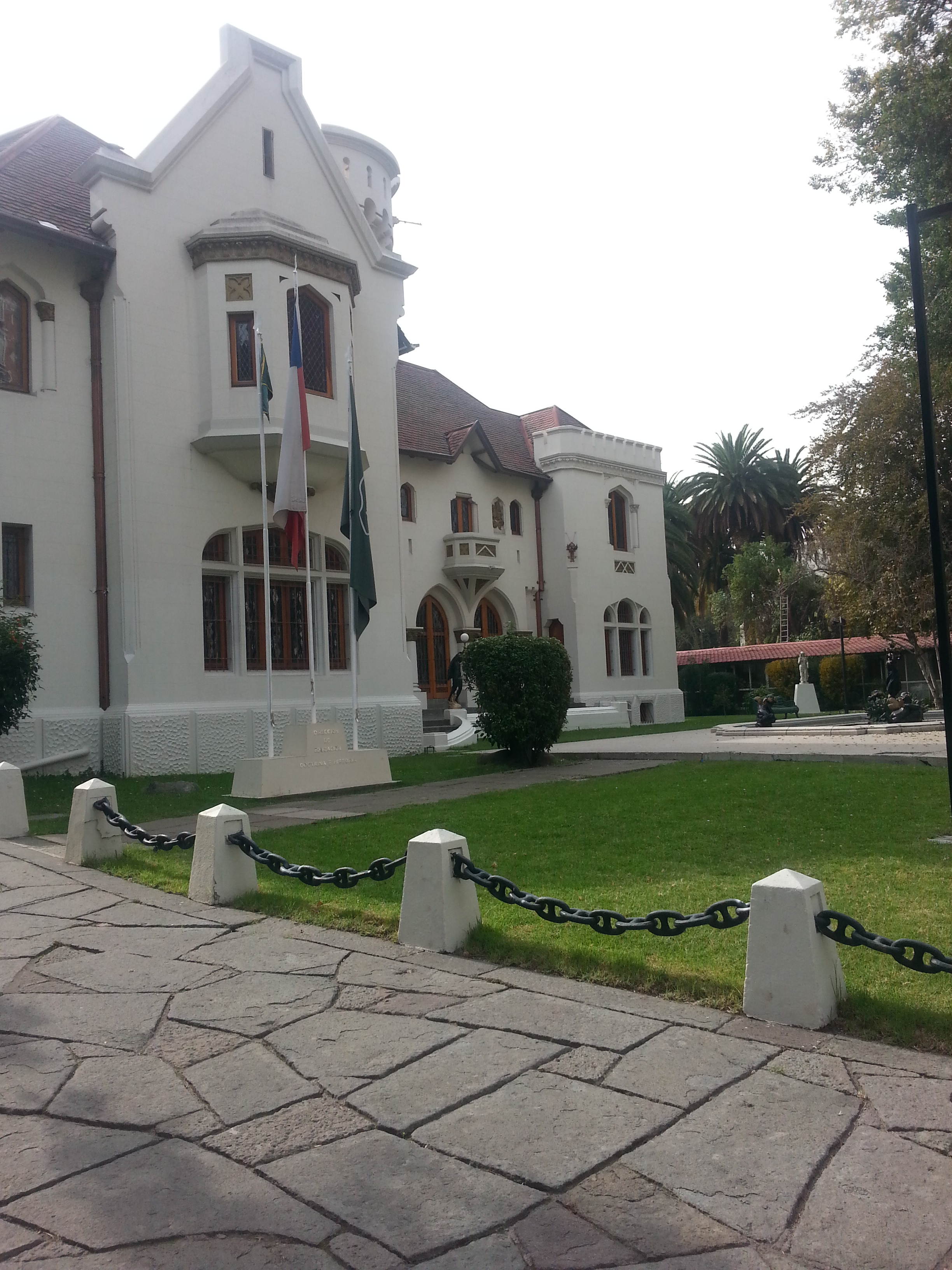 Vista exterior del palacio Ortúzar en Ñuñoa, Santiago de Chile